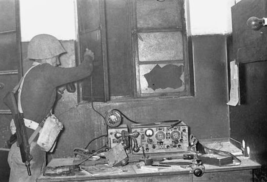 לוחם ליד מכשיר הקשר במשטרה, לפני הפיצוץ. מקום הצילום: קלקיליה.